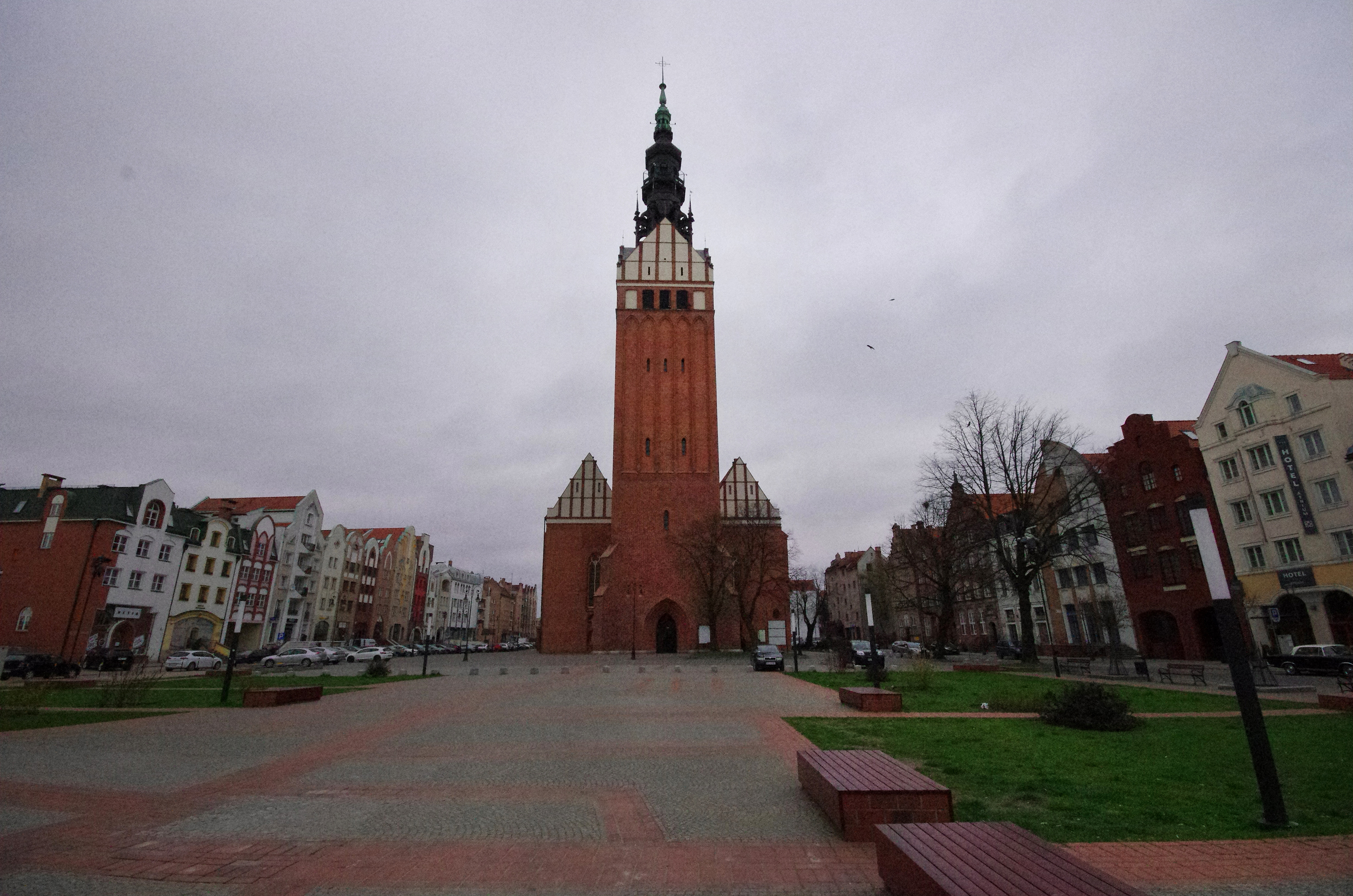 Костёл Св. Николая со стороны площади. 2017 г.